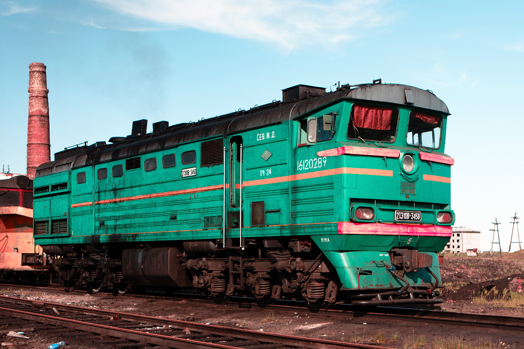 2ТЭ10В-3458